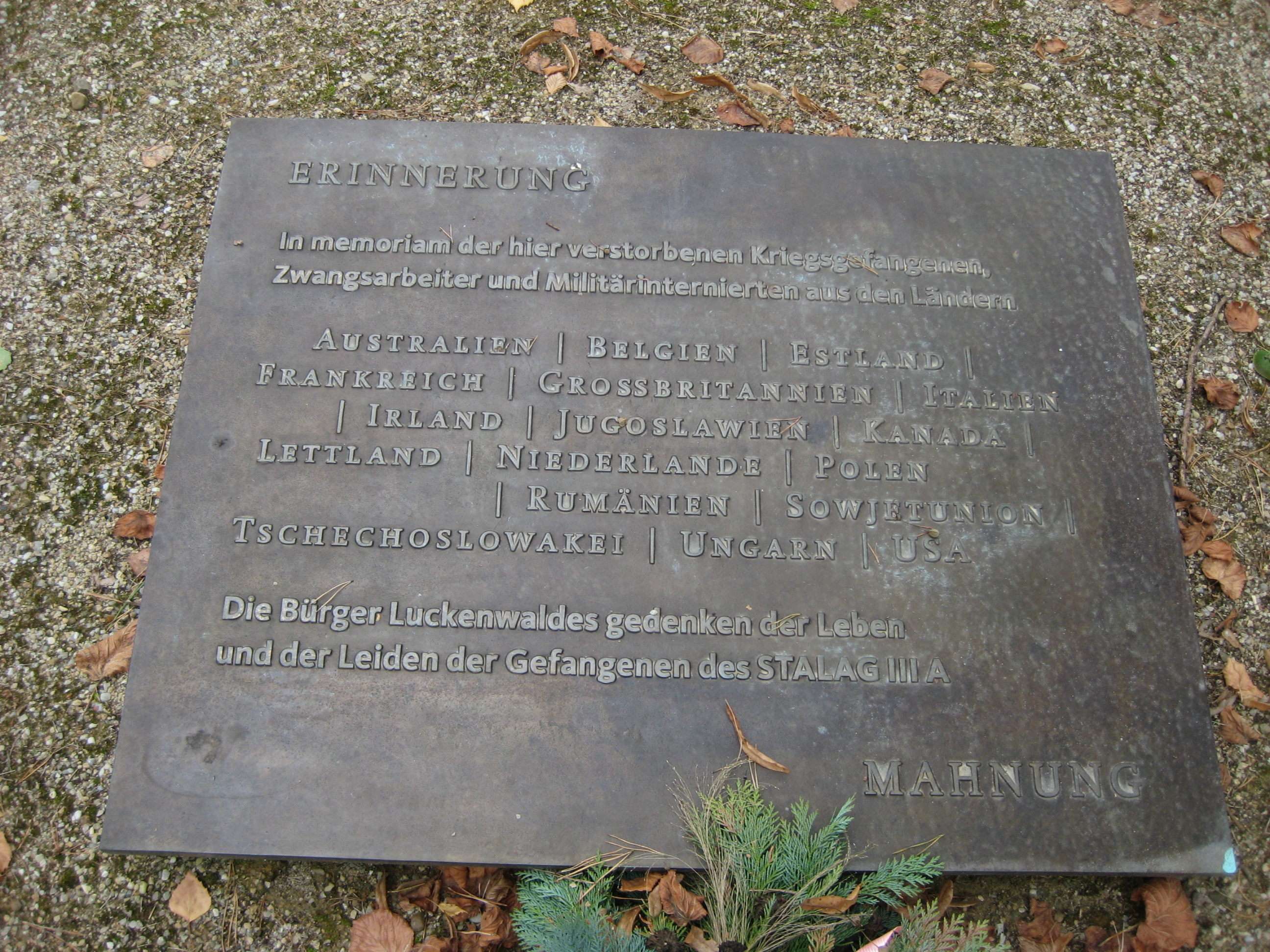 Erinnerungstafel der Stalag IIIa Gedenkstätte